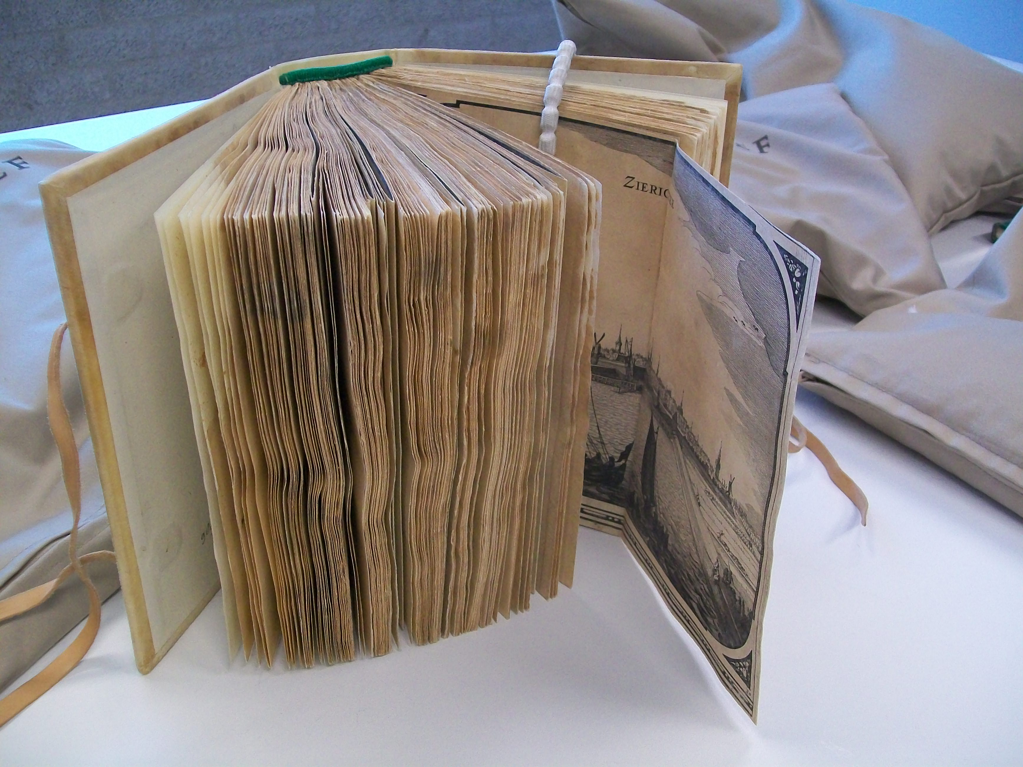 Chroniick van Zeelandt met ingevoegde prenten uit het Speculum Zelandiae